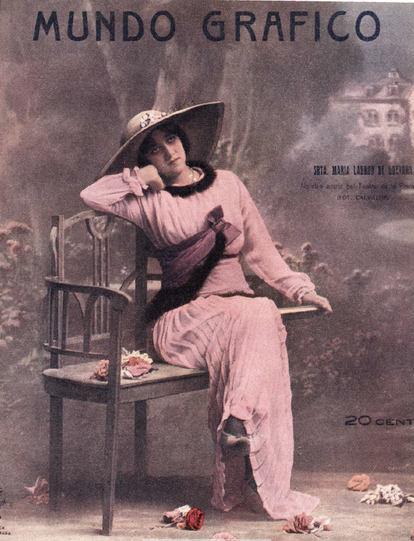 Fotografía de la actriz española María Fernanda Ladrón de Guevara publicada en 1914 en la portada de Mundo Gráfico